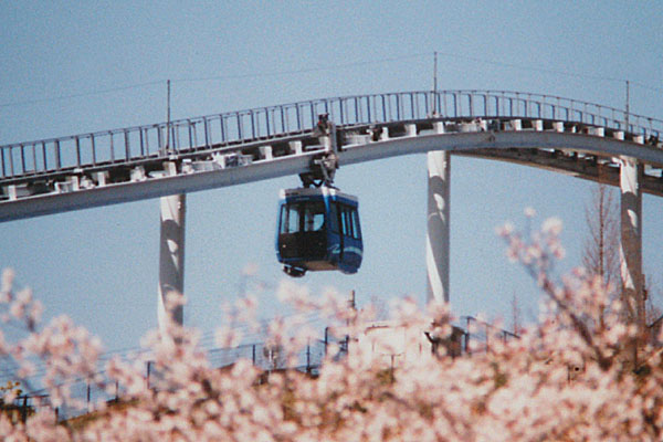 Hiroshima Short Distance Transit Seno Line (Skyrail). 広島短距離交通瀬野線(スカイレール)。みどり中街-みどり口間にて。